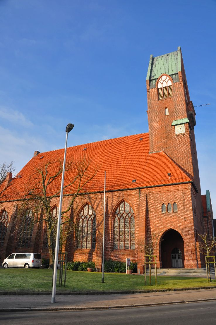 Cuxhaven Feb 2013